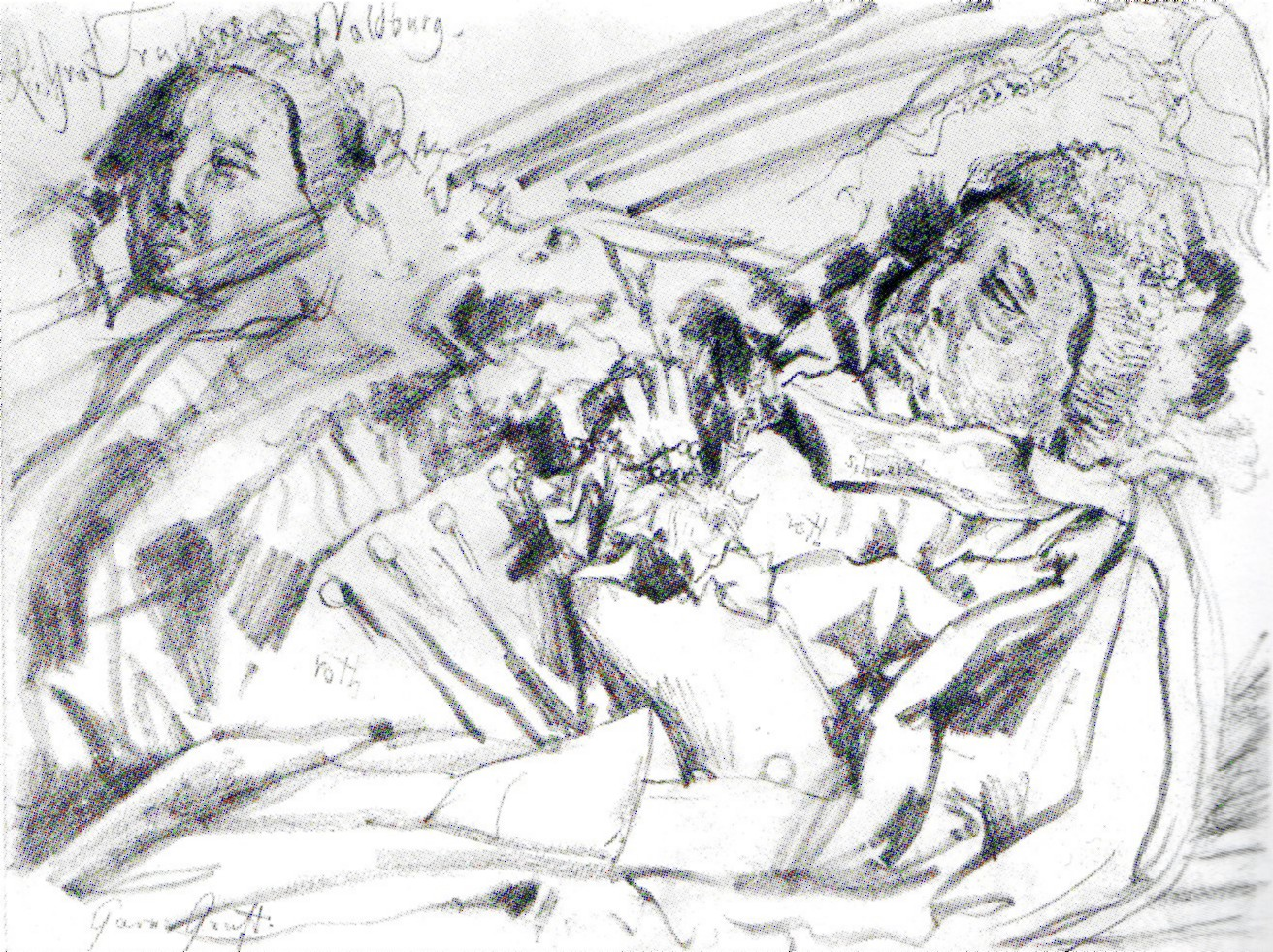 Leiche des Reichsgrafen Truchsess von Waldburg, Garnison-Gruft, Bleistiftzeichnung 1873